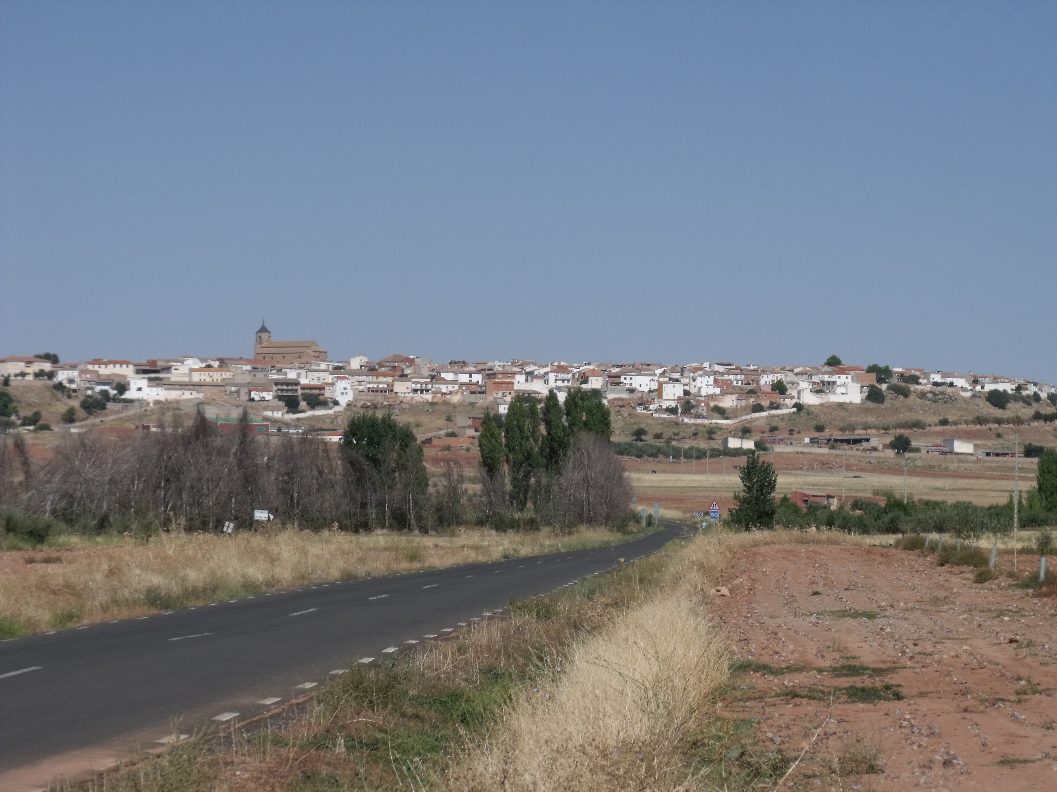 Almedina